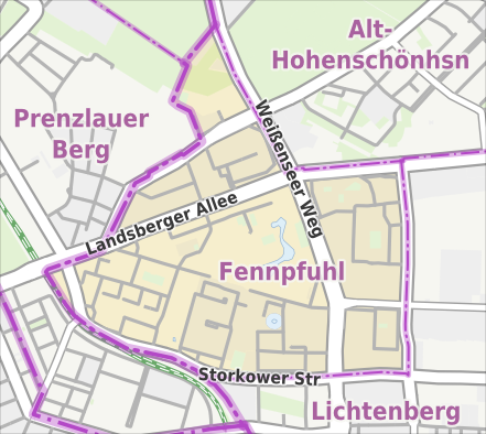 Übersichtskarte der Straßen und Ortslagen in Berlin-Fennpfuhl